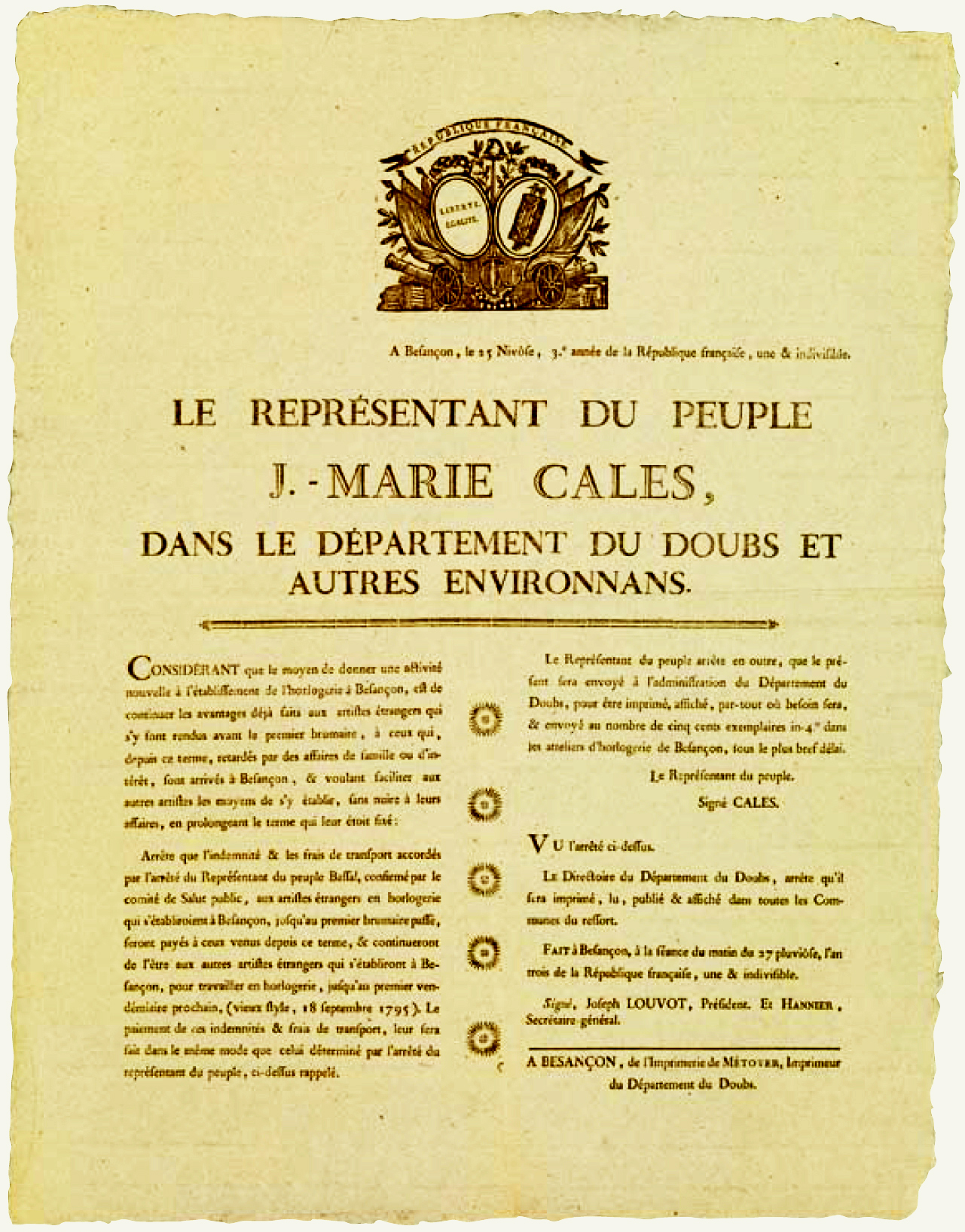 « Le représentant du peuple J.- Marie Calès dans le département du Doubs et autres environnans (sic): Considérant que le moyen de donner une activité nouvelle à l’établissement de l’horlogerie à Besançon, est de constituer les avantages déjà faits aux artistes étrangers qui s’y sont rendus avant le premier brumaire [22 octobre 1794], à ceux qui, depuis ce terme, retardés par des affaires de famille ou d’intérêt, sont arrivés à Besançon, & voulant faciliter aux autres artistes les moyens de s’y établir, sans nuire à leurs affaires, en prolongeant le terme qui leur était fixe : Arrête que l’indemnité & les frais de transport accordés, par l’arrêté du Représentant du peuple Bassal, confirmé par le comité de Salut public, aux artistes étrangers en horlogerie qui s’établissaient à Besançon, jusqu’au premier brumaire passé [22 octobre 1794], seront payés à ceux venus depuis ce terme, & continueront de l’être aux autres artistes étrangers qui s’établiront à Besançon, pour travailler en horlogerie, jusqu’au premier vendémiaire prochain, (vieux style, 18 [sic, 23] Septembre 1795). Le paiement de ces indemnités & frais de transport, leur sera fait dans le même mode que celui déterminé par l’arrêté du représentant du peuple, ci-dessus rappelé. Le Représentant du peuple arrête en outre, que le présent sera envoyé a l’administration du Département du Doubs, pour être imprimé, affiché, par-tout ou besoin sera, & envoyé au nombre de cinq cents exemplaires in-4° dans les atteliers (sic) d’horlogerie de Besançon, sous le plus bref délai. Le Représentant du peuple. Signé CALES. »